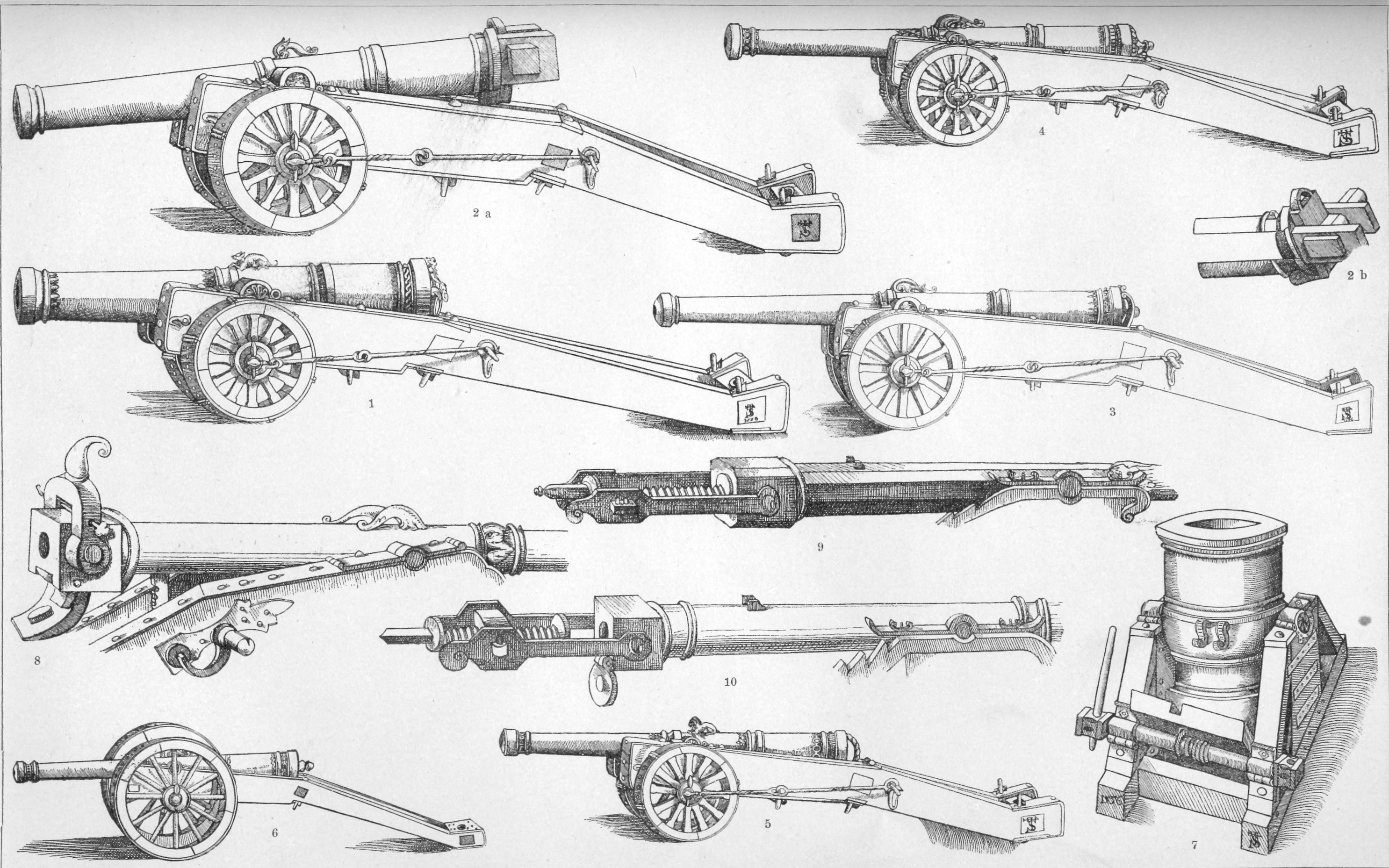 Artillerie um die Mitte des 16. Jahrhunderts nach dem Kriegsbuch des Reinhard von Solms Beschreibung nach Essenwein: Quellen zur Geschichte der Feuerwaffen: 1. Doppel Karthaune: Länge das 17fache ihres Kalibers; Gewicht 80 Zentner, schießt 70 Pfund Eisen 2. a.b.: Steinbüchse mit Hinterladungssystem "Solche stück sind gut in den befestungen, da man nit vil platz hat sie umb zuwenden, und forn einladen muß, deßgleichen auff den Schiffen, und schießen stein un nit eisen, bedörffen nit fouil puluers zu lade als wenn sie eisen schössen, und dörffen die stück auch nit so dick sein als die eisen schiessen" 3. Notschlange. Länge das 42fache ihres Kalibers; Gewicht 66 Zentner; schießt 16 Pfund Eisen 4. Quartier- oder halbe Schlange. Länge: das 34 fache ihres Kalibers; Gewicht 24 Zentner;schießt 7 Pfund Eißen. 5. Falkon. Länge: das 40fache ihres Kalibers ; Gewicht 15 Zentner; schießt 2 Pfund Eisen. 6. Falkonet oder Feldschänglein. Länge das 44fache ihres Kalibers; Gewicht 6 Zentner; schießt 1 Pfund Eisen 7. Mörser